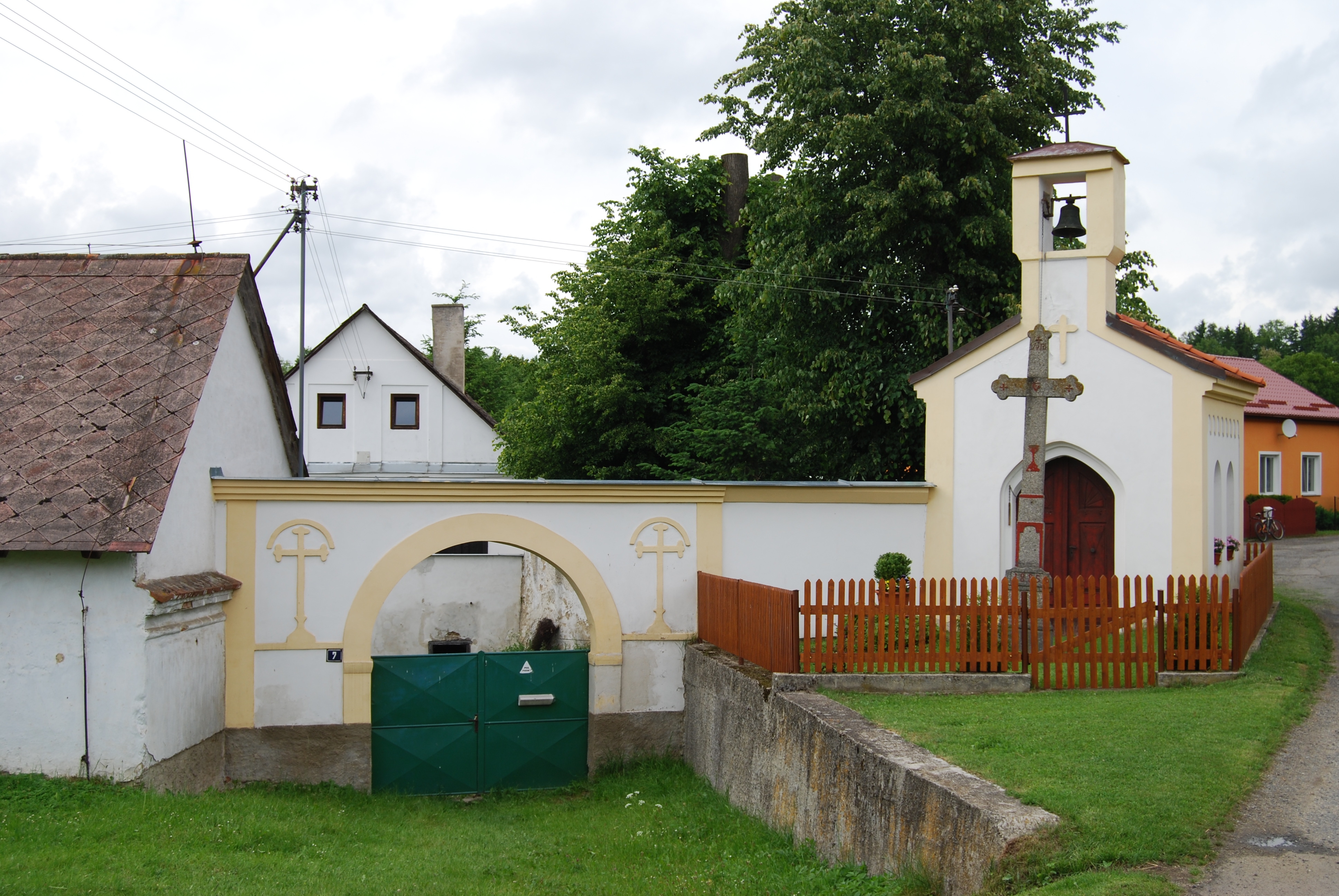 Kříž a kaple v obci na návsi. Kaple je zasvěcena Panně Marii Sepekovské. Blehov je část obce Zhoř v okrese Písek. Česká republika.